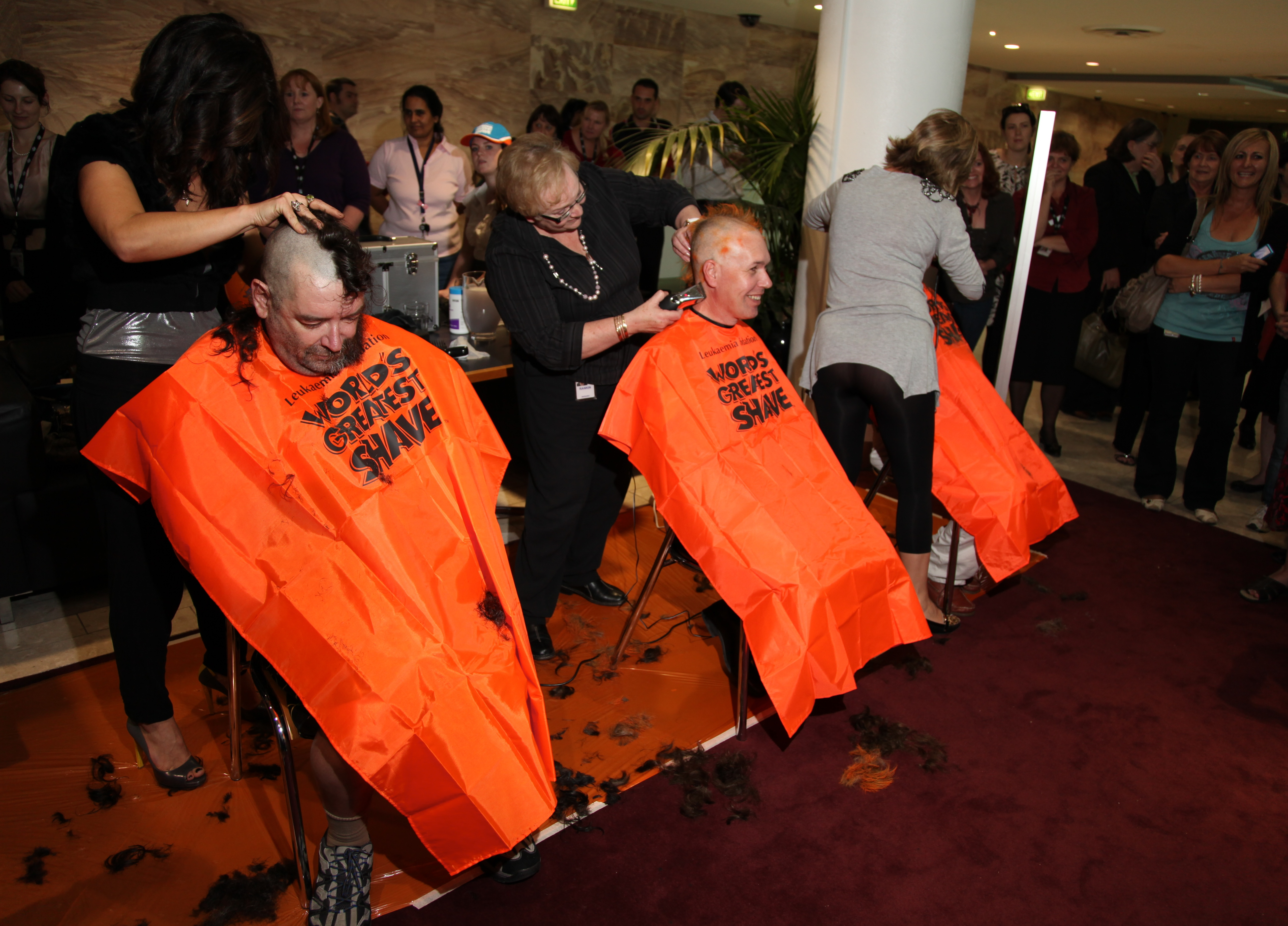 Shave (9)